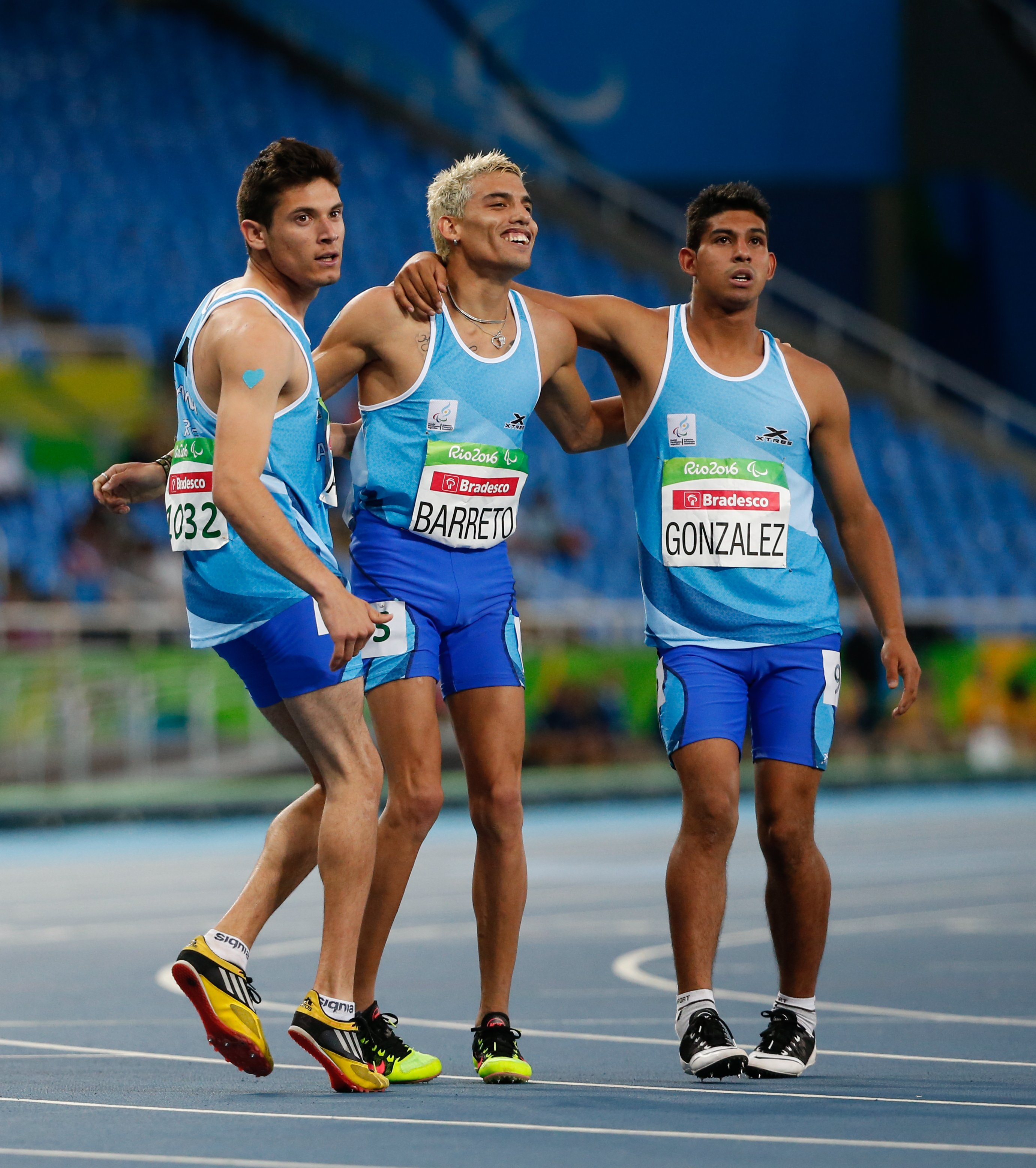 Hernán Barreto (medalla de bronce), Nicolás Aravena (6º) y Diego Martín Conzález (7º). Atletas argentinos en los Juegos Paralímpicos Río 2016. Prueba 100 m llanos T35.